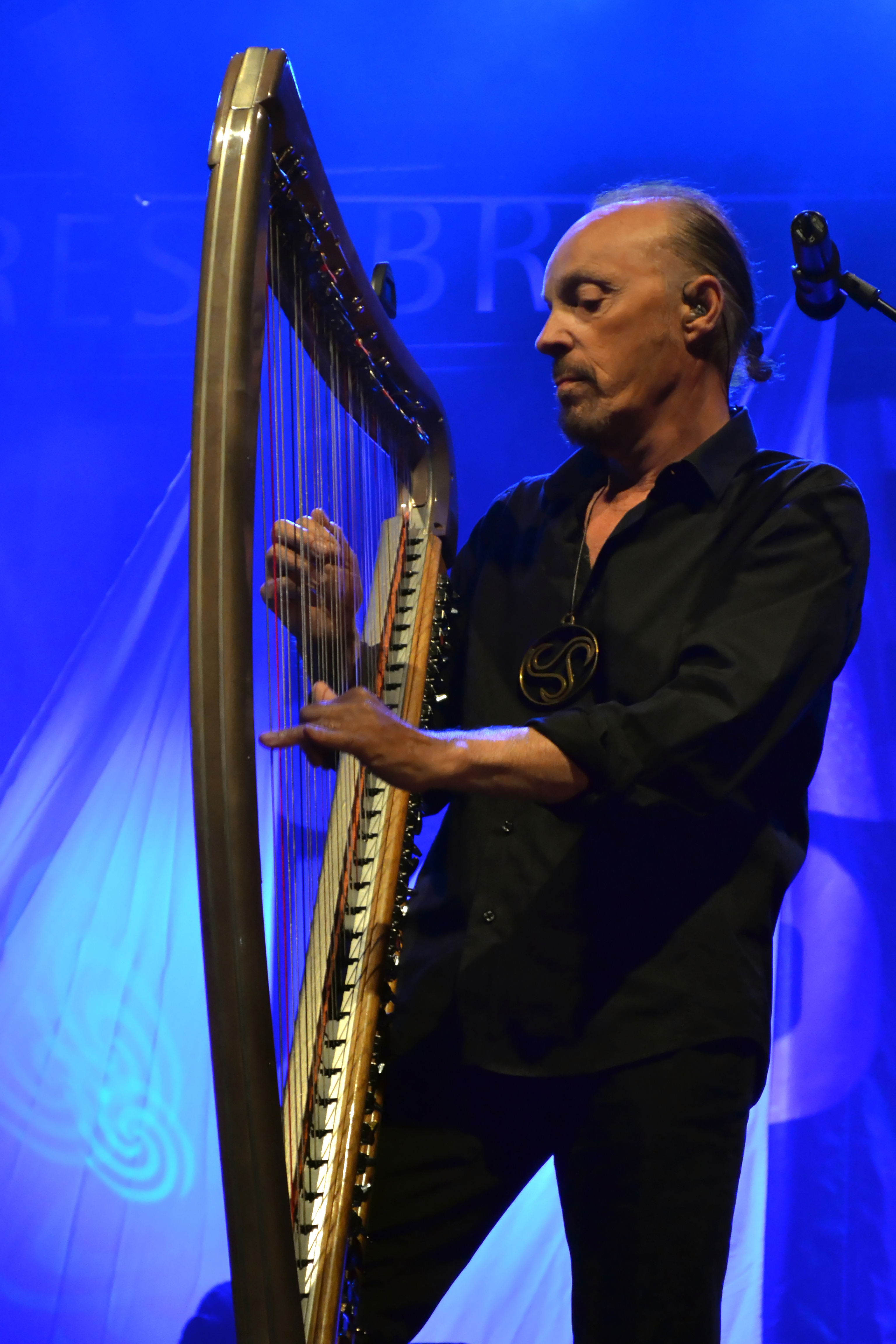 Alan Stivell en concert gratuit lors des Jeudis du port à Brest le 15 août 2013.